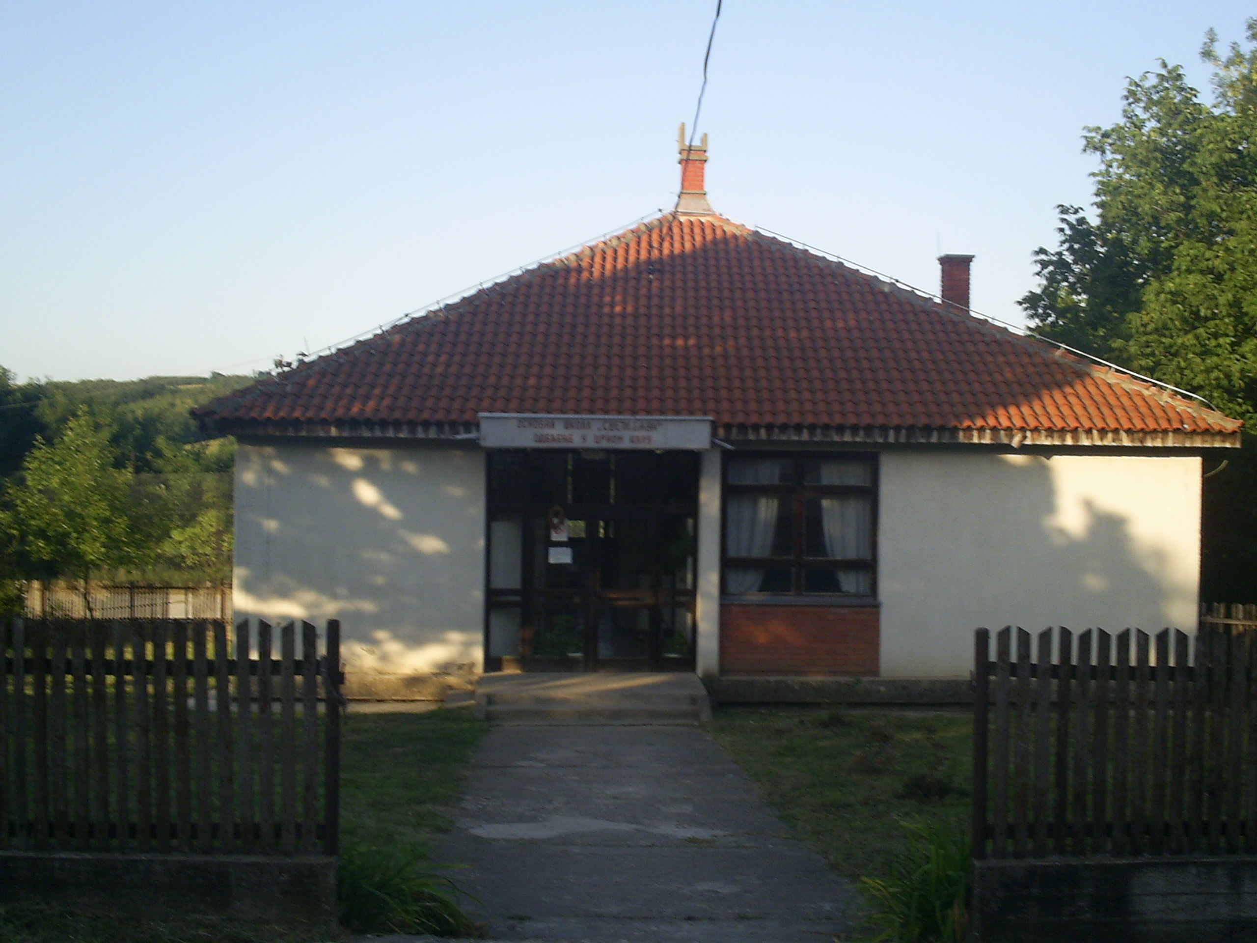 Основна школа „Свети Сава" Баточина издвојено одељење Црни Као